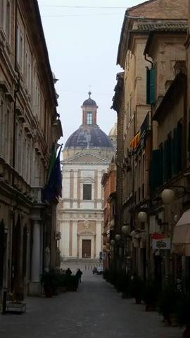 Corso